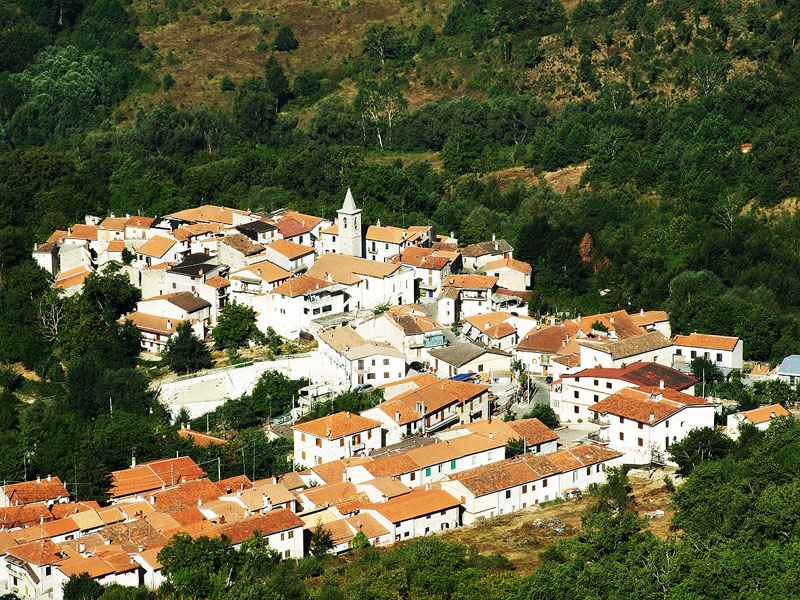 Gallo